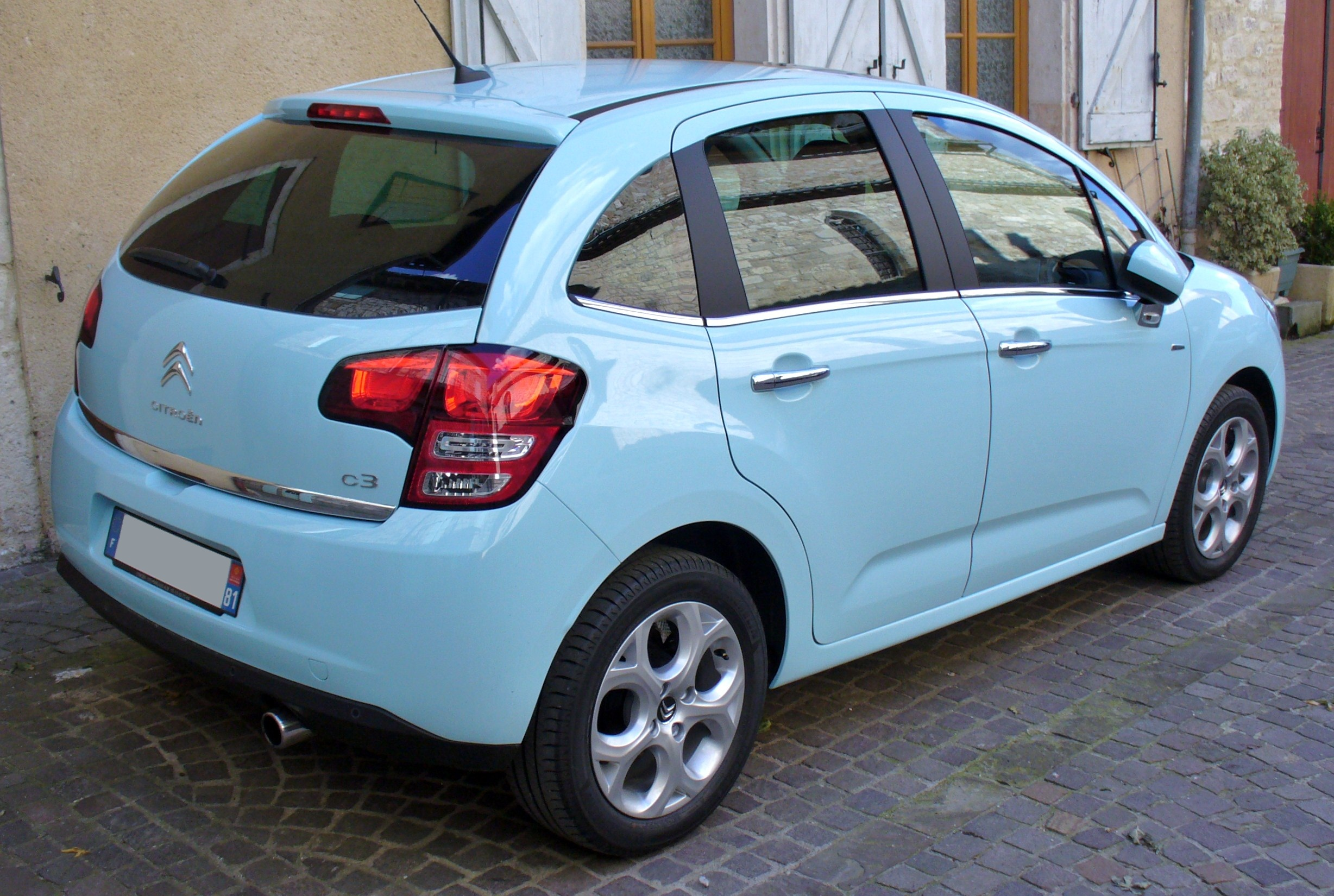 Citroen C3